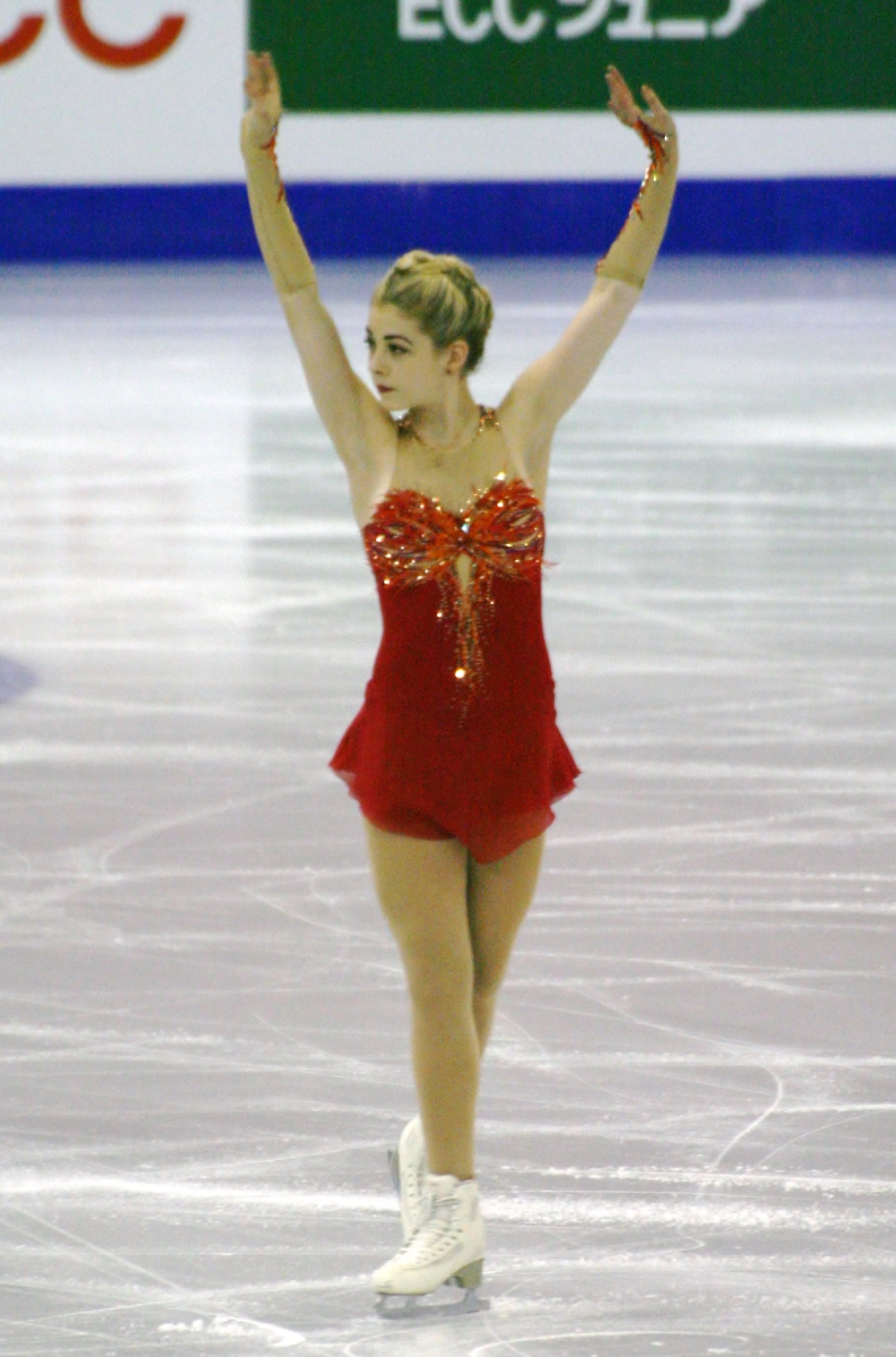 Грейси Голд (США) на финале Гран-при по фигурному катанию 2015-2016.